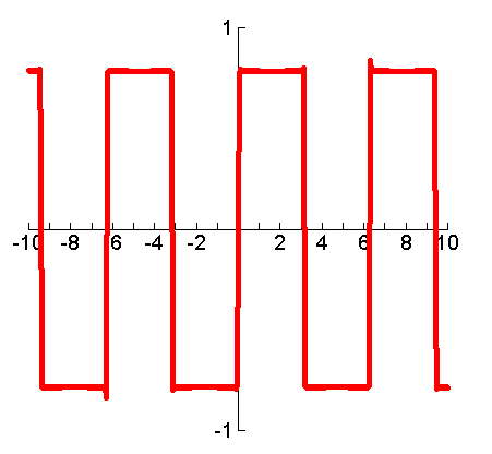 Blokgolf Benadering met 500 Termen, doch is deze nog steeds verre van perfect